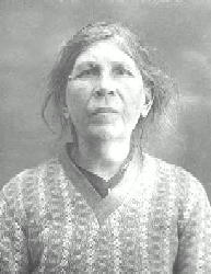 Селиверстова София Панфиловна, преподобномученица Русской православной церкви